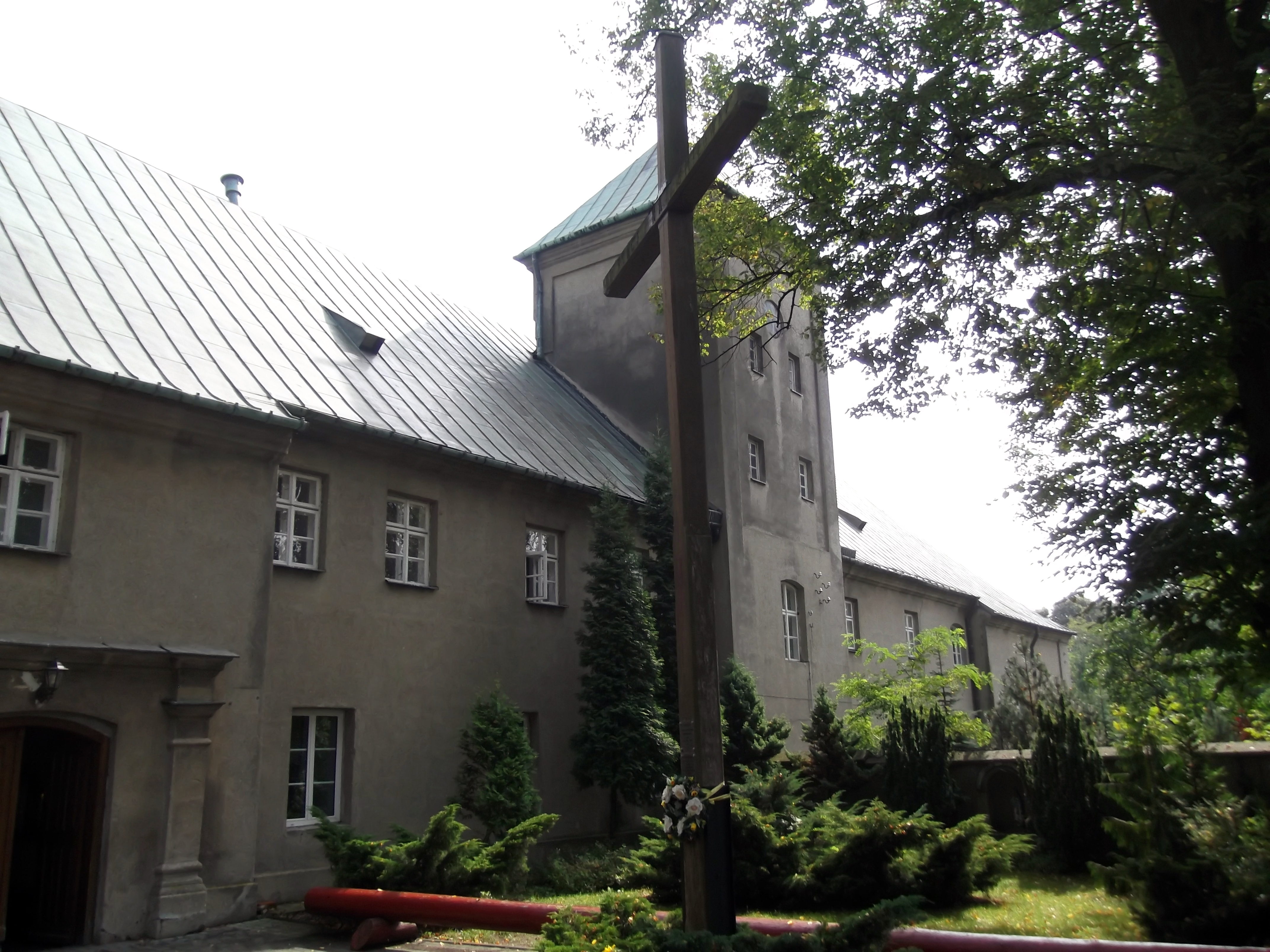 Łódź, klasztor, 1735–1746